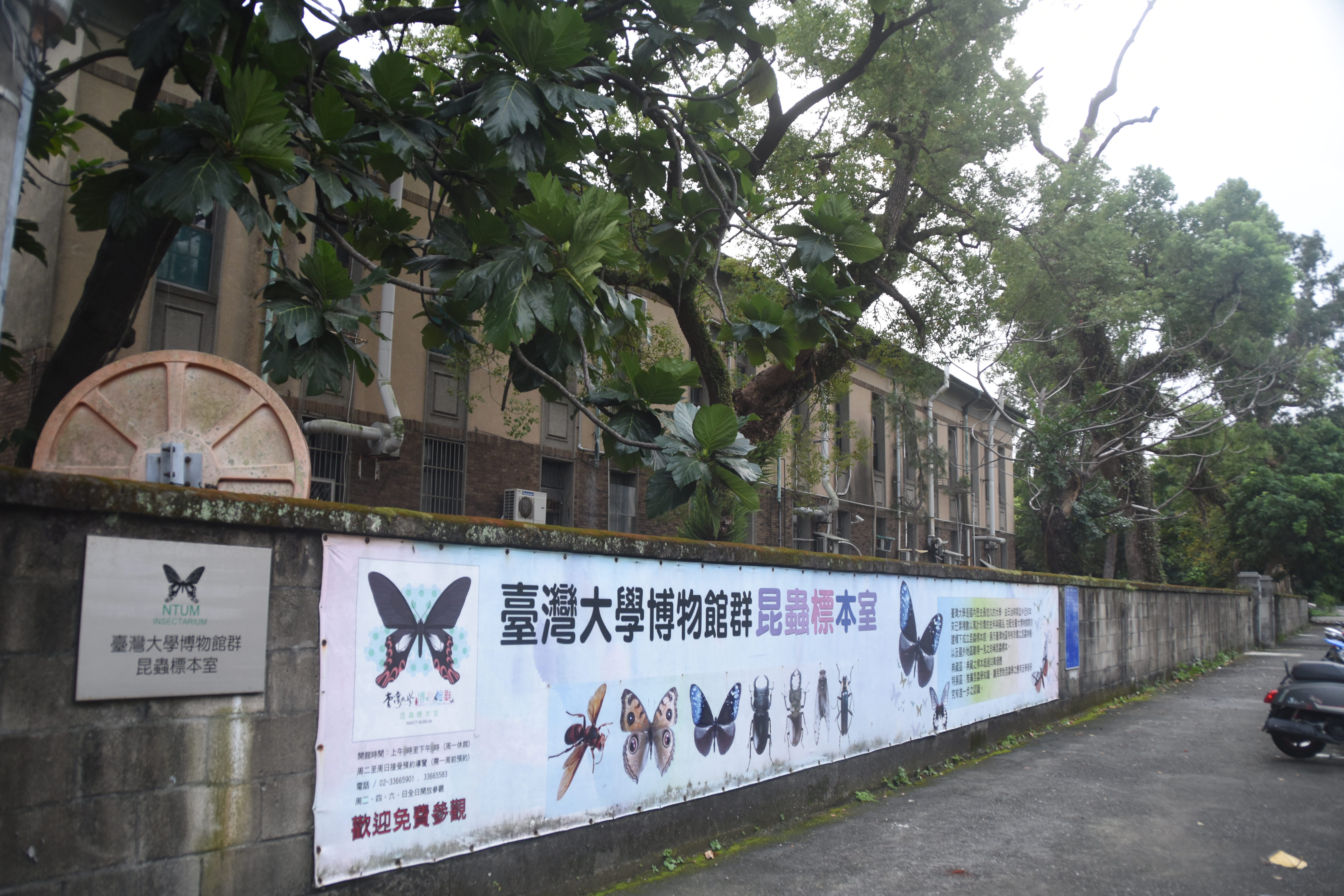 臺大昆蟲館外部門面